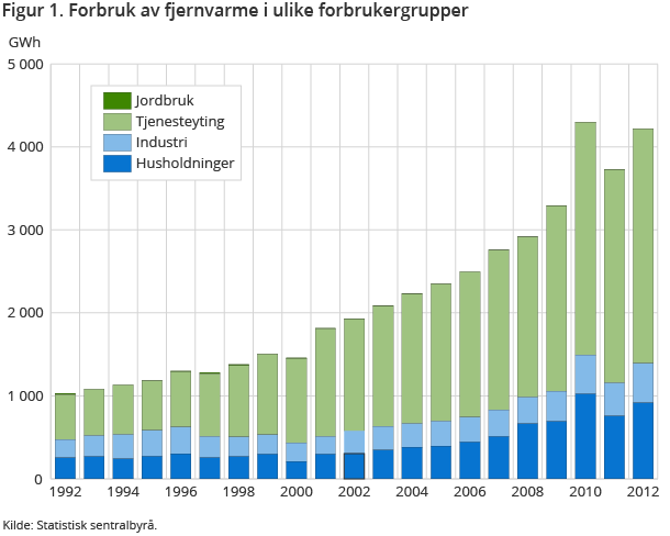 Statistisk sentralbyrå.